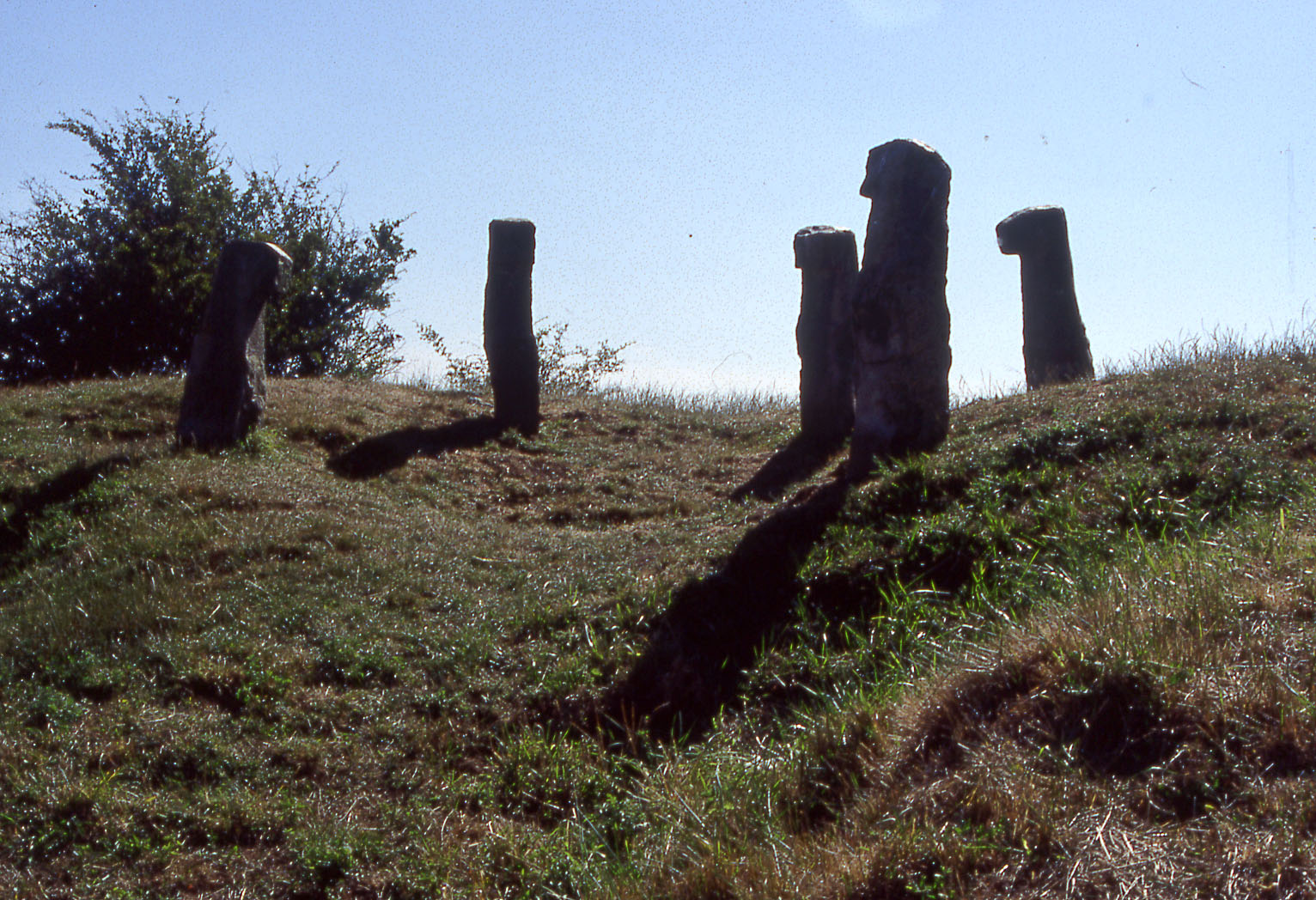 les Bonnettes de Sailly-en-Ostrevent (Pas-de-Calais)